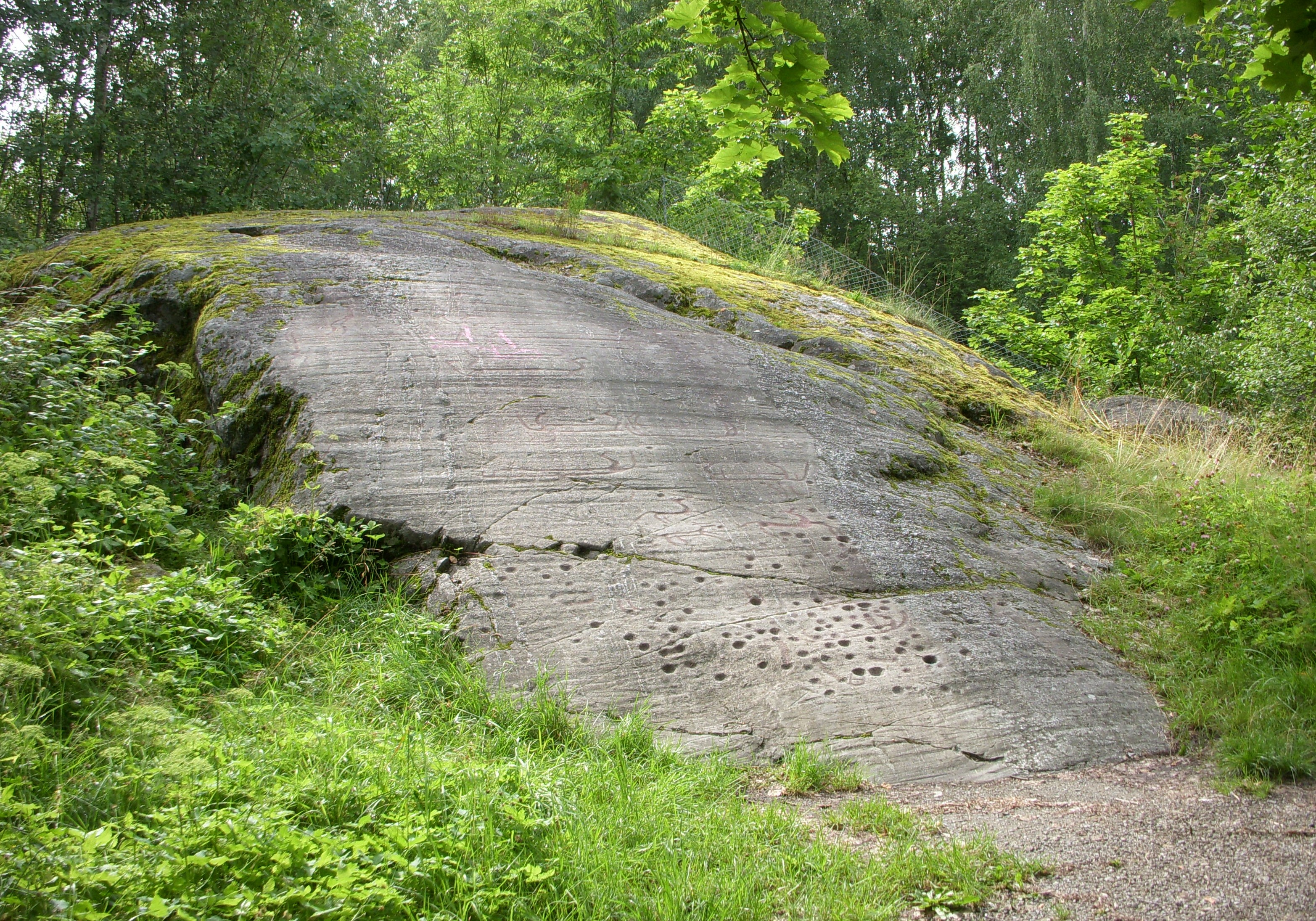 Slagstaristningen i Botkyrka, södra Stockholm